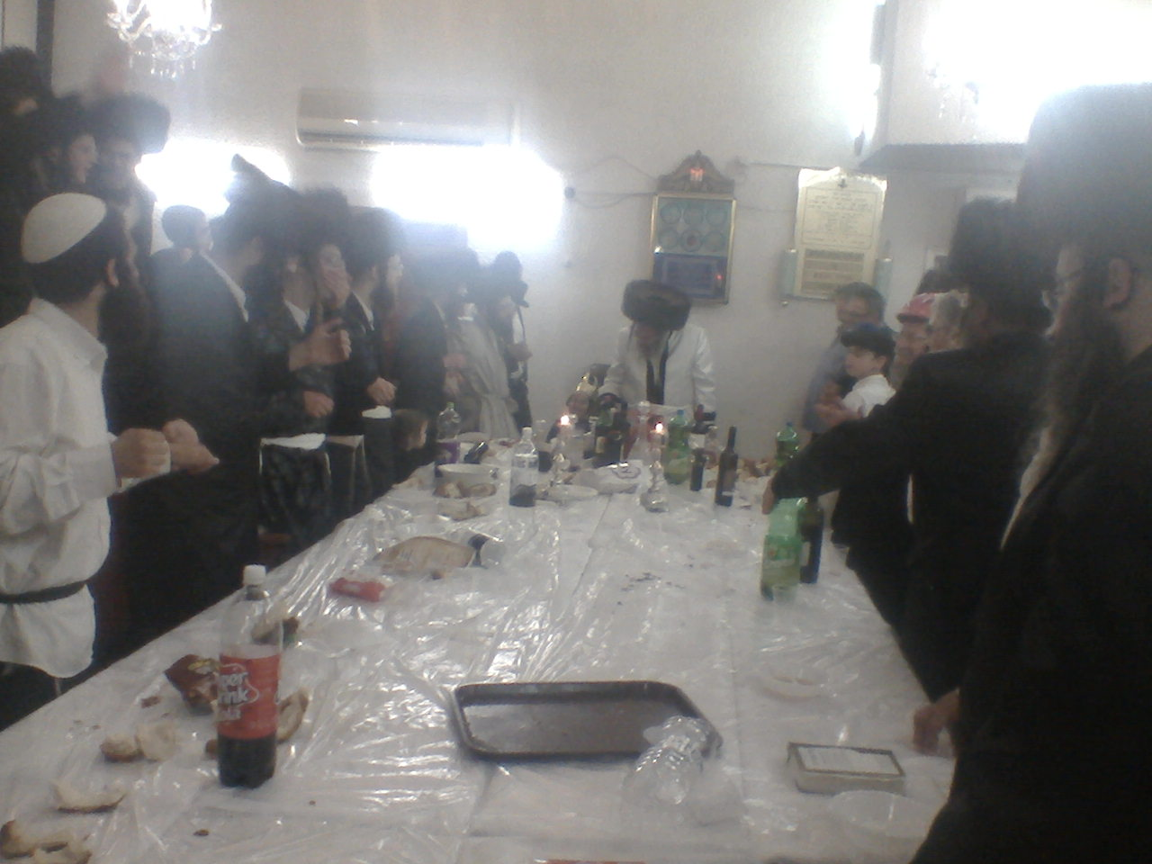 האדמ"ור במרכז התמונה לבוש חליפה לבנה, ובצדדים ילדיו וחסידיו ב"טיש" שהיתקיים לכבוד פורים